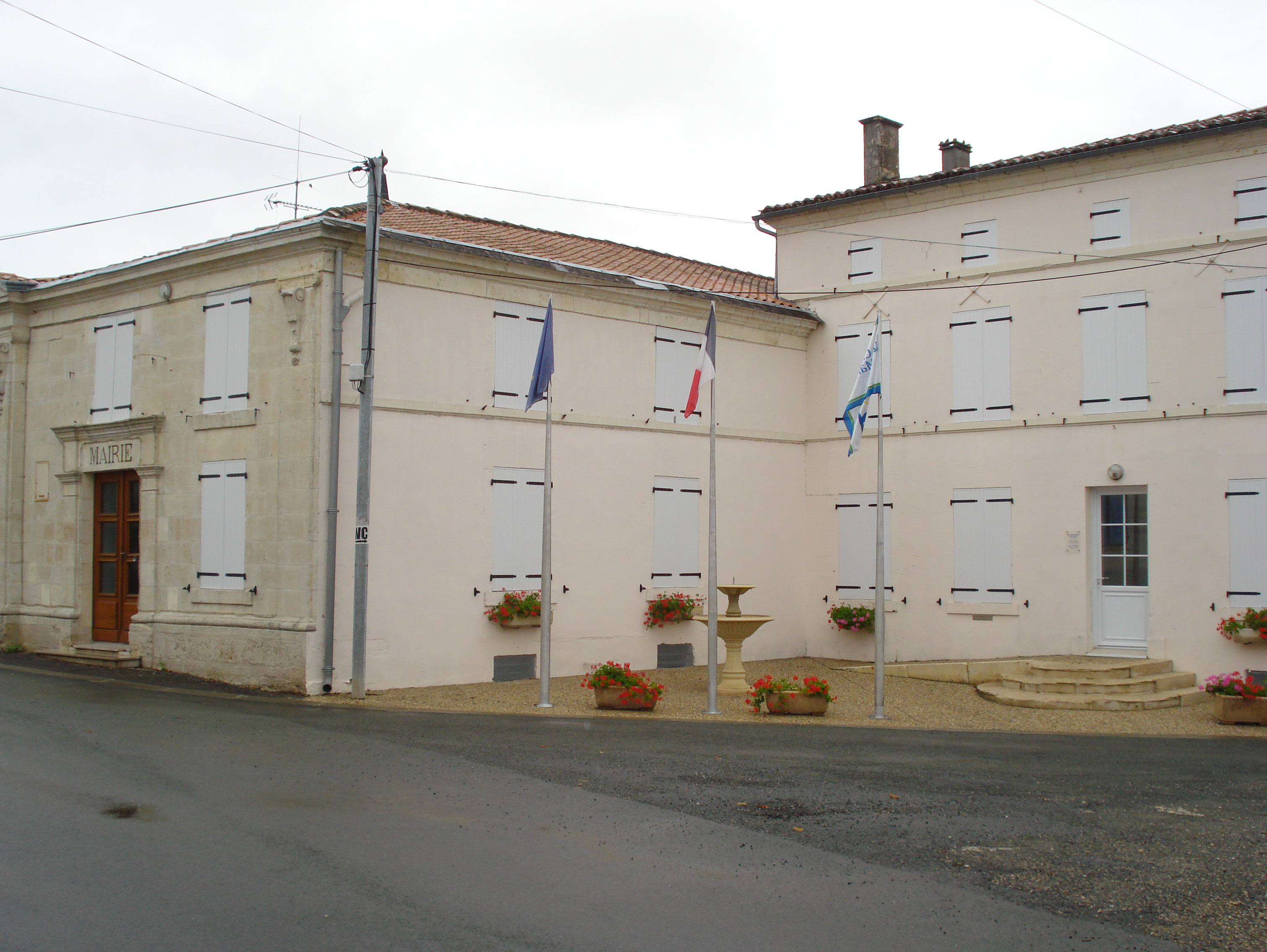 La mairie de Cherbonnières